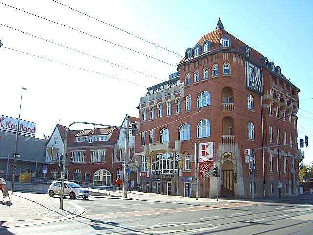 Ehemaliger Straßenbahnhof Dresden-Naußlitz; heute Geschäftshaus mit Kaufland-Supermarkt